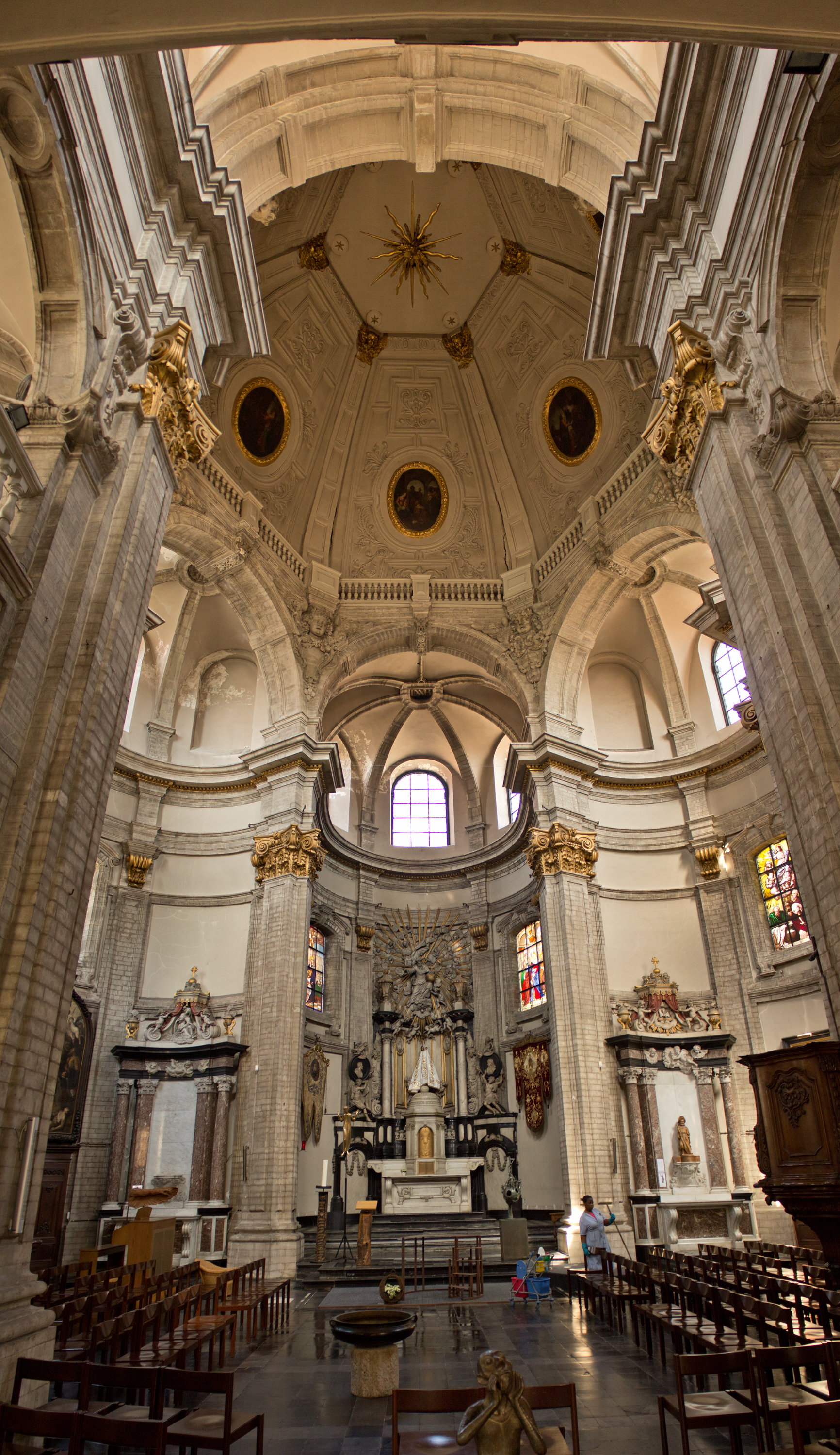 Onze-Lieve-Vrouw van Goede Bijstandkerk, Brussel